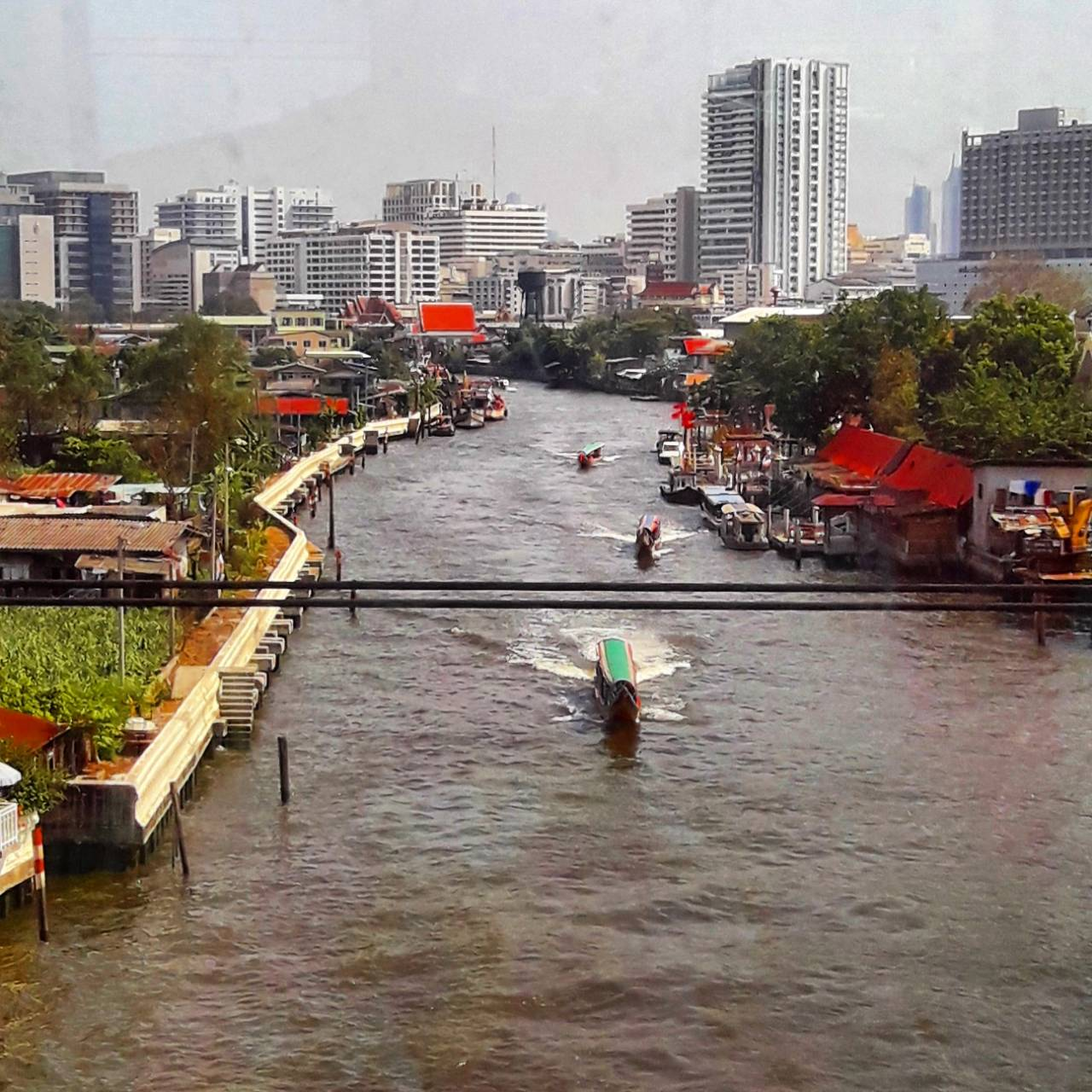 คลองบากอกน้อย ทิวทัศน์จากรถไฟฟ้ามหานคร สายเฉลิมรัชมงคล